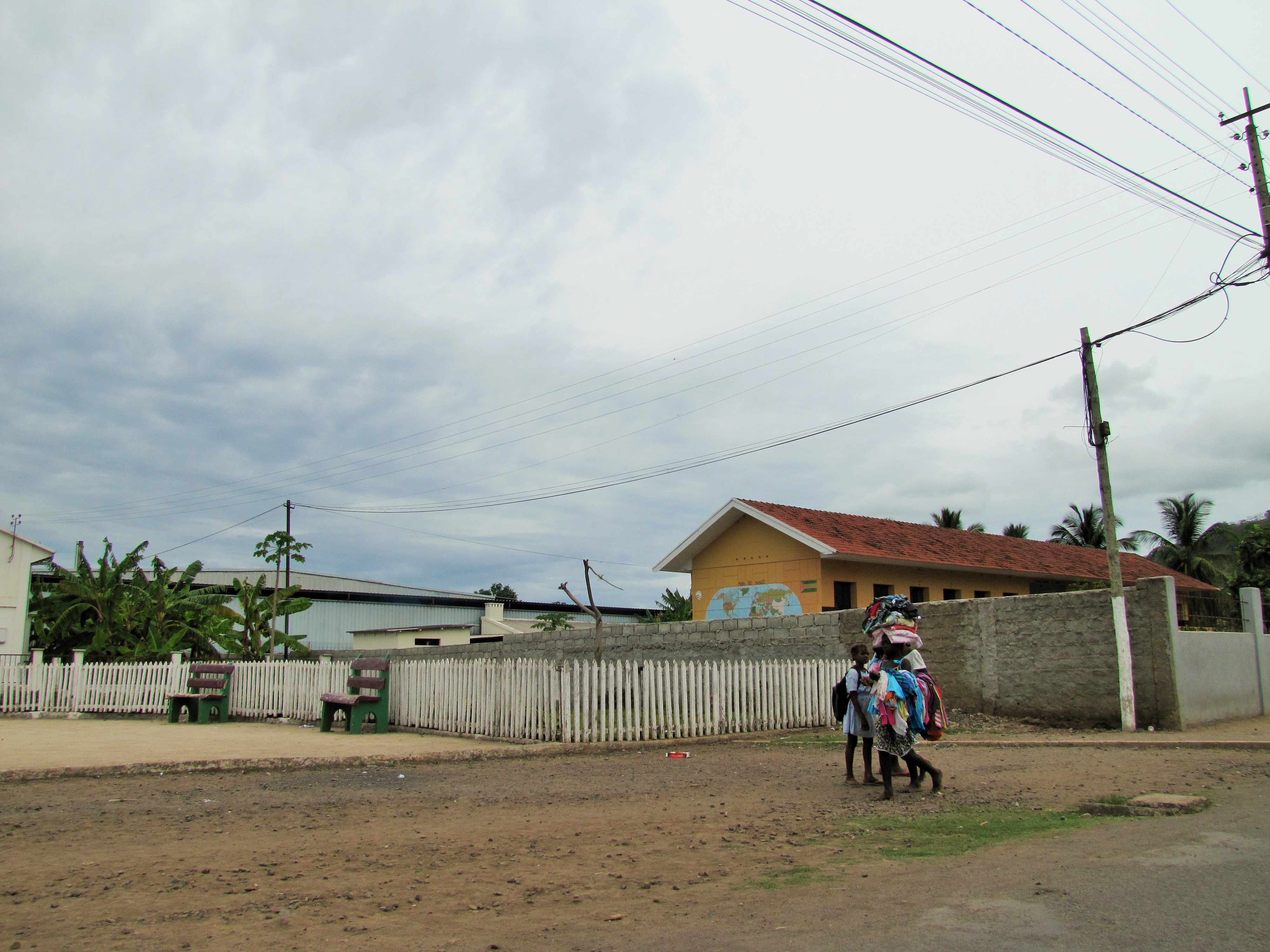 Sao Tome Neves 2